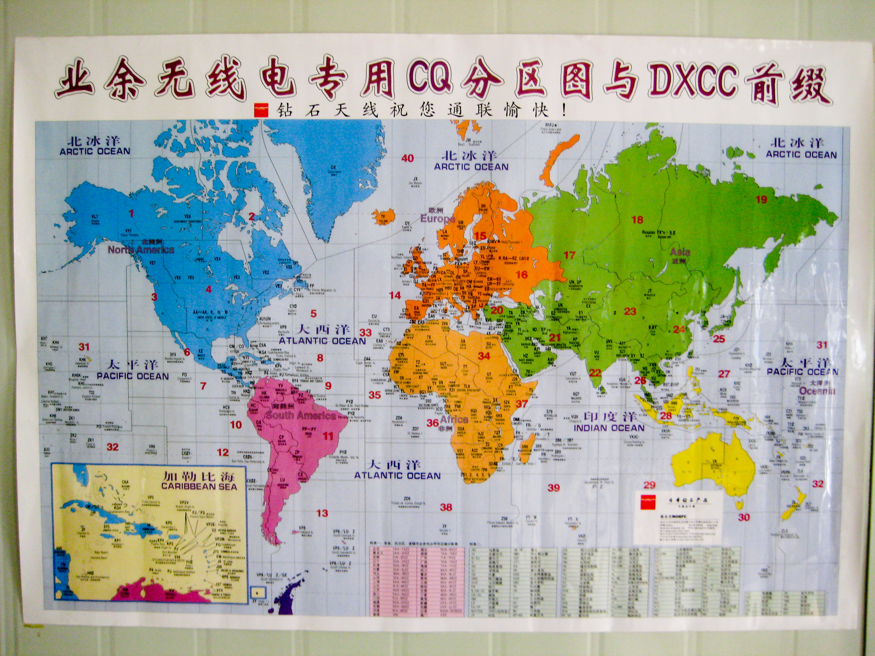 IZ4AKS/BY1RX - Beijing - China - Nov. 09